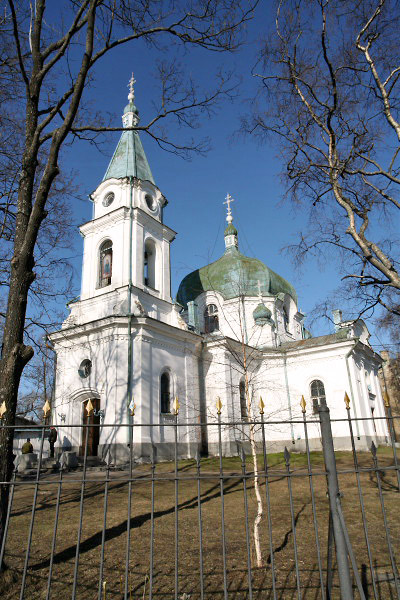 Никольская церковь. Арх. Николай Гребенка